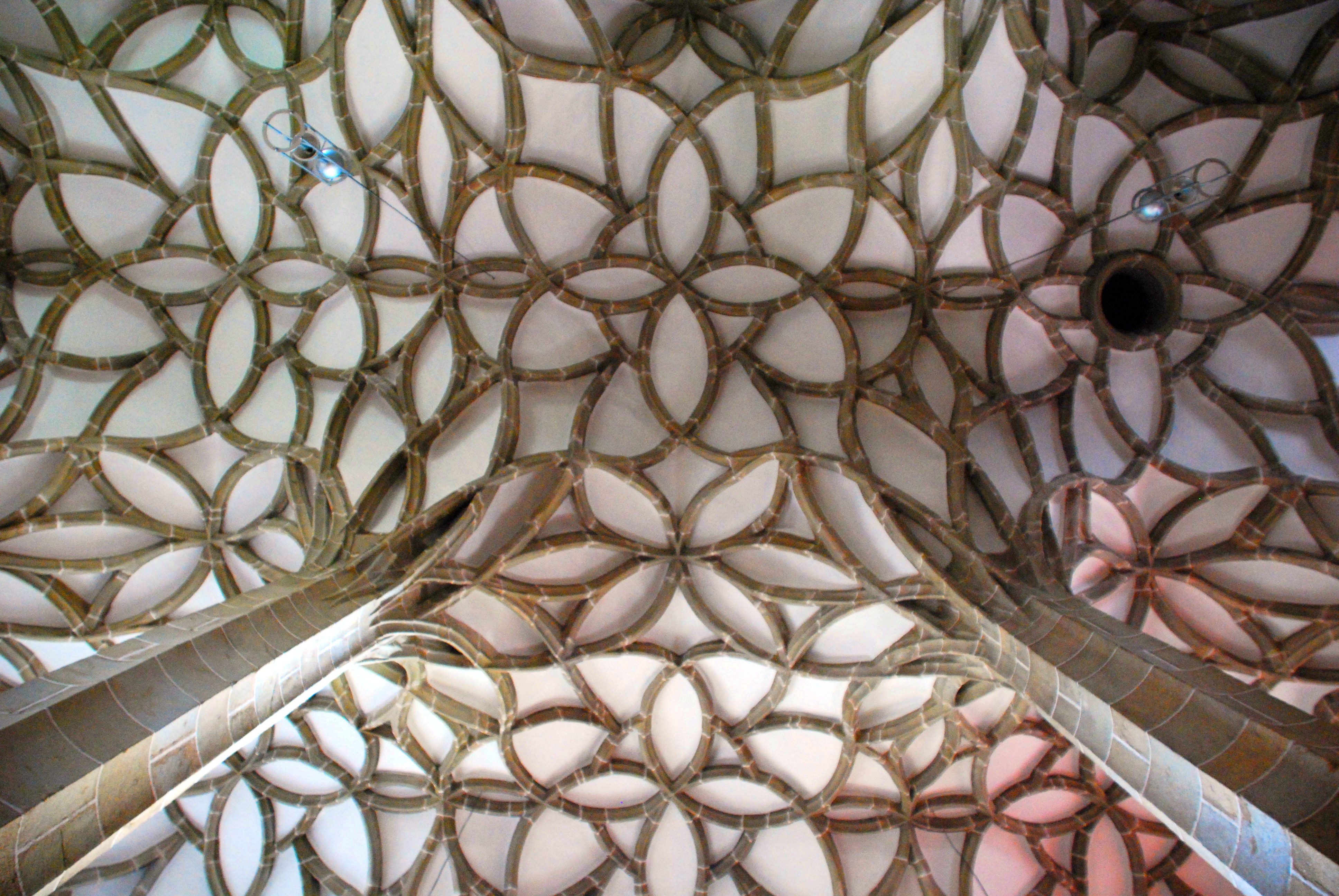 Pfarrkirche Koenigswiesen Schlingrippengewoelbe